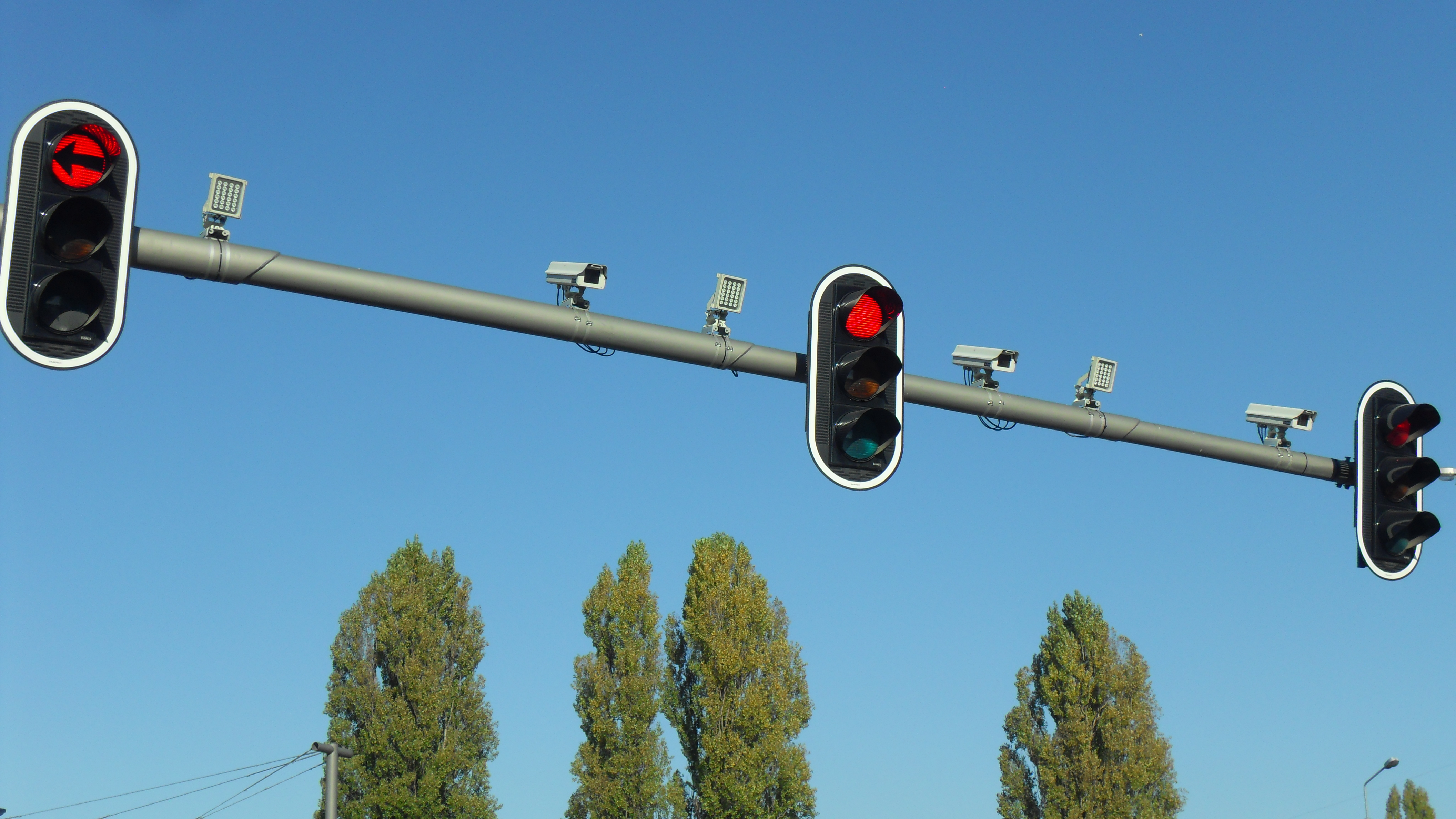 Gdańsk Oliwa, al. Grunwaldzka, urządzenia systemu Tristar.